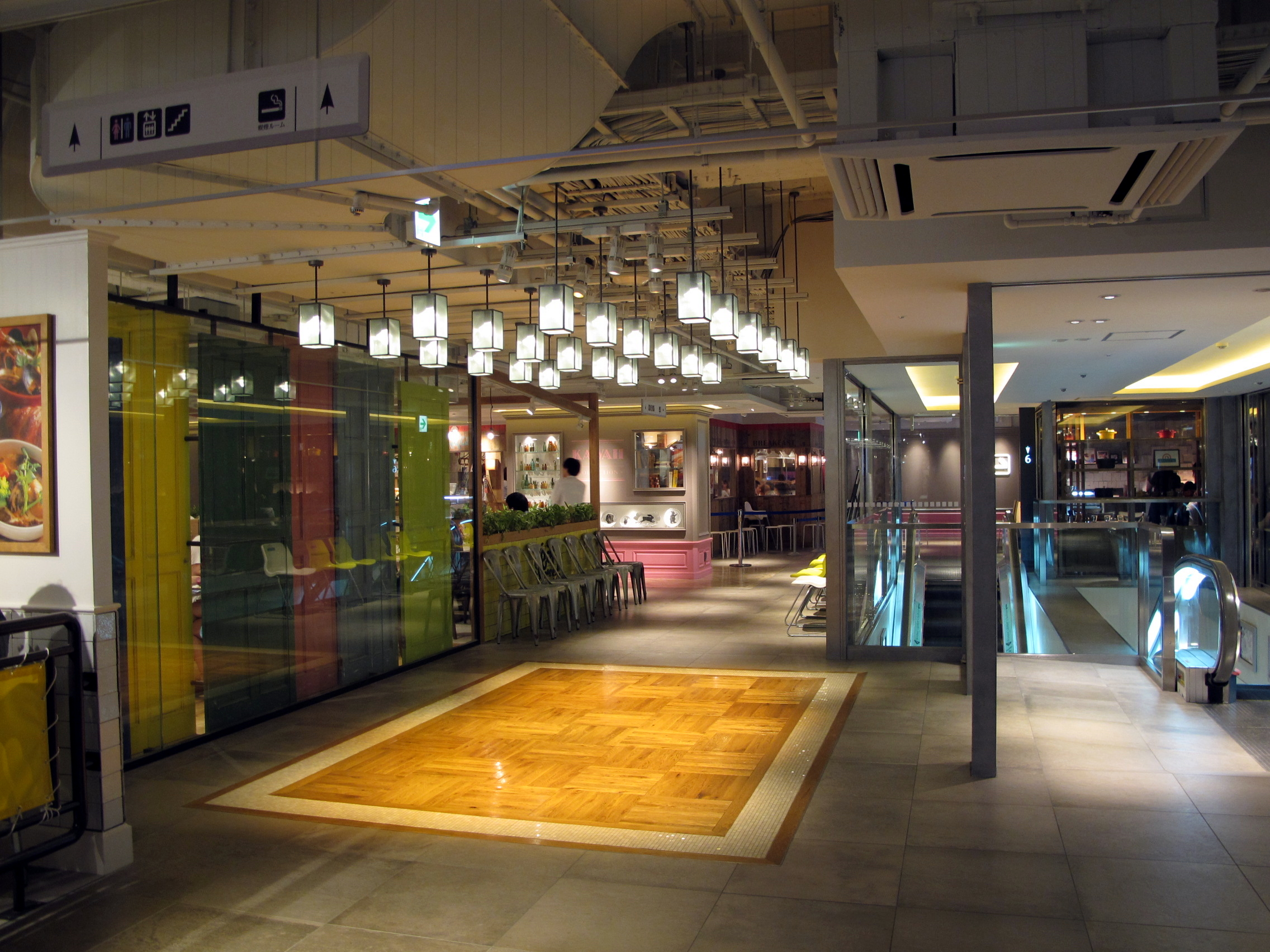 LUMINE EST Level 7 Dinner